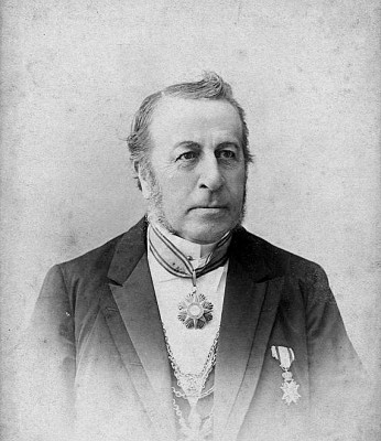 Wilhelmus Petrus Adrianus Mutsaers (1833-1907)